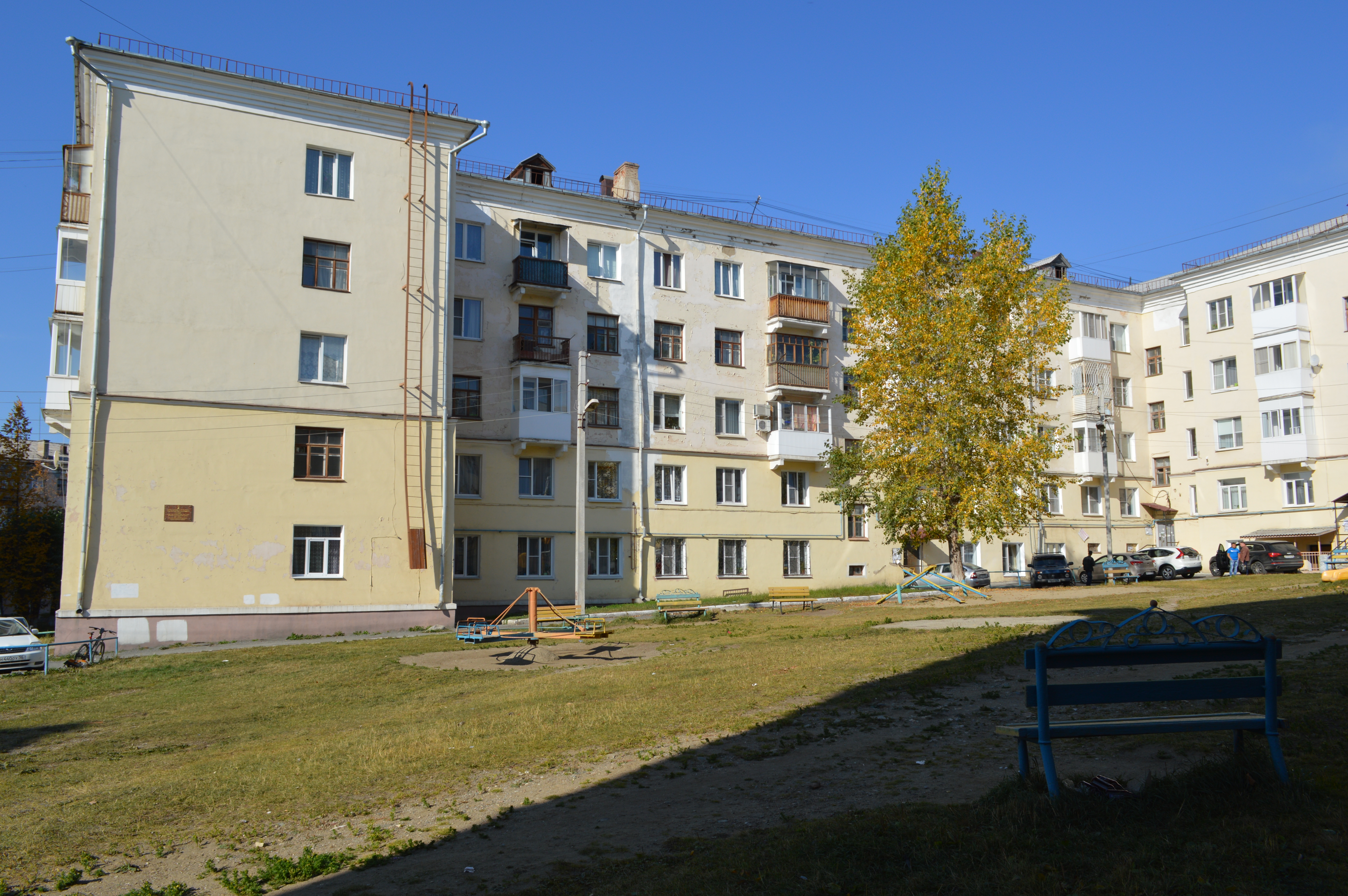 Дом, в котором с 1976 по 2001 гг. жил герой Советского Союза А.Ф. Петрик: улица Молодёжная, 7, Краснотурьинск, Свердловская область